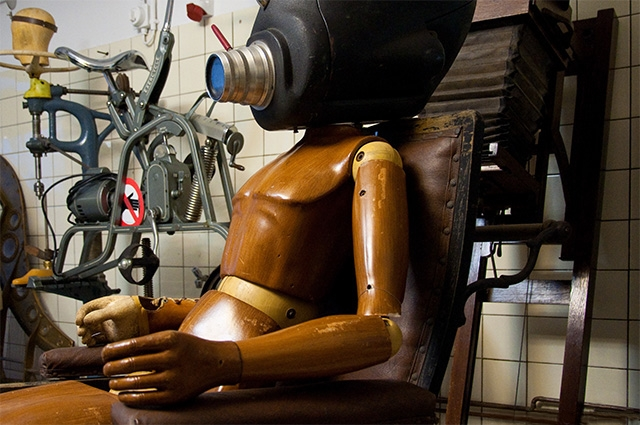 DesignPanoptikum - Museum für skurrile Objekte, Berlin